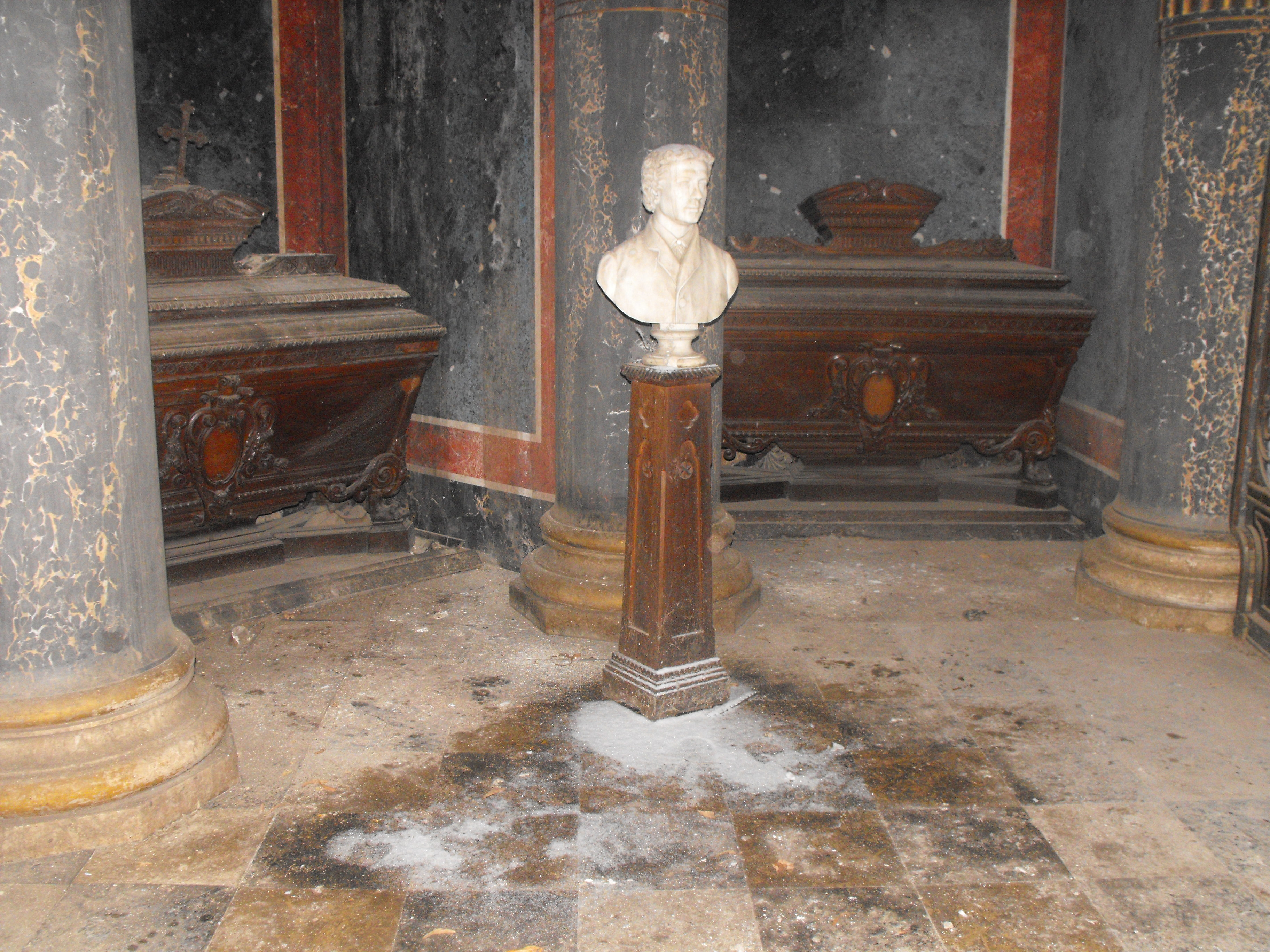 Mausoleul familiei Filișanu 01